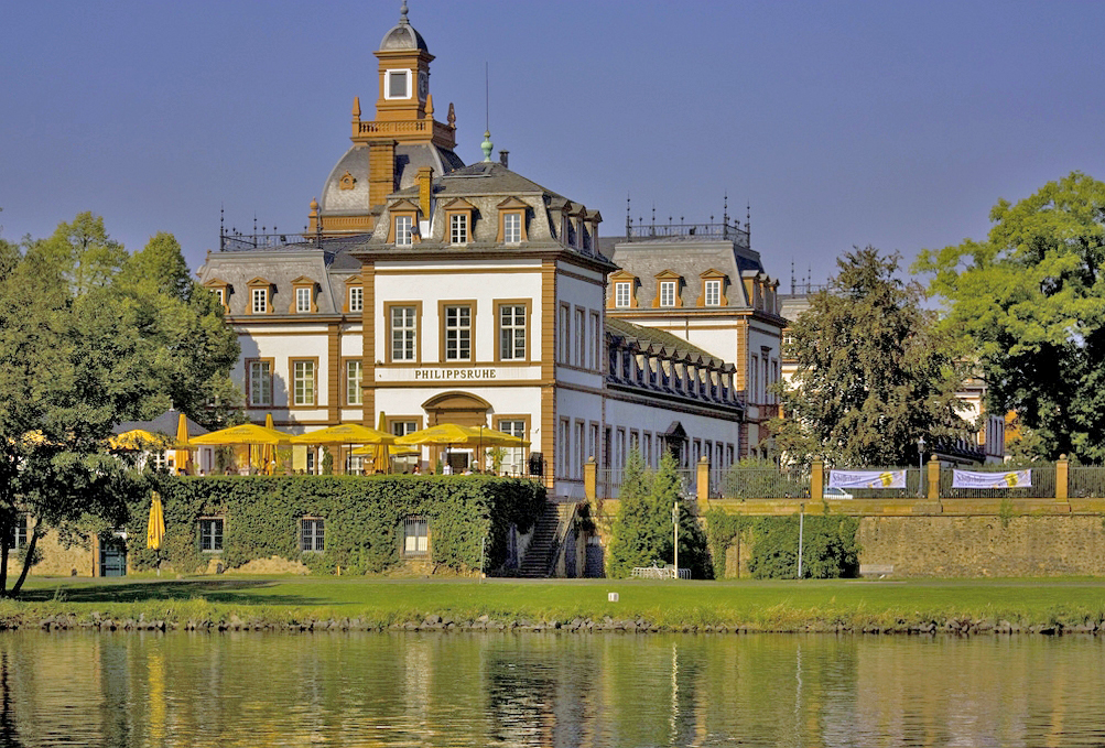 Schloß Phillipsruhe, von gegenüberliegender Mainseite aufgenommen(Steinheim).